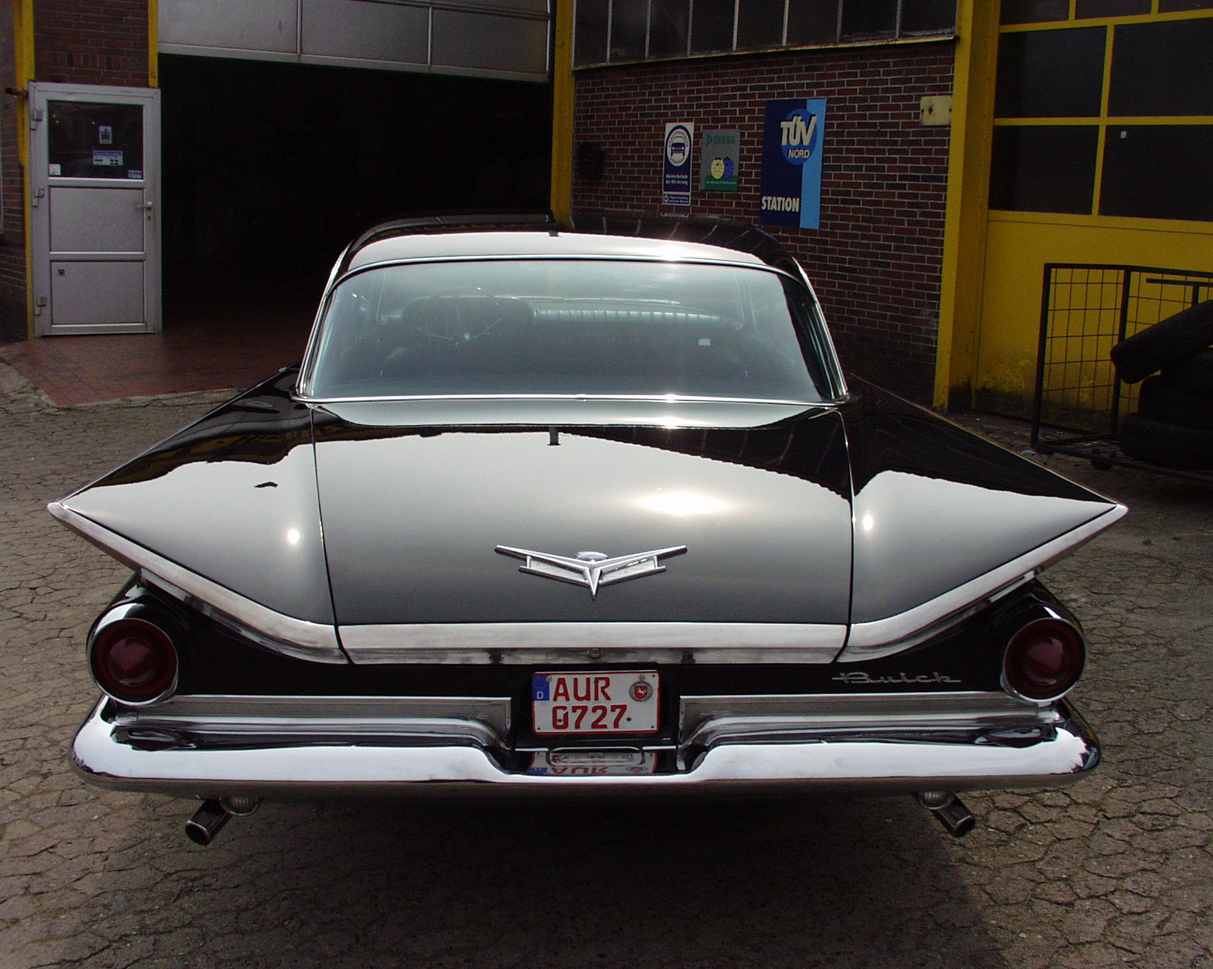 Buick Electra 225 Riviera Sedan von hinten mit den einzigartigen Deltawings